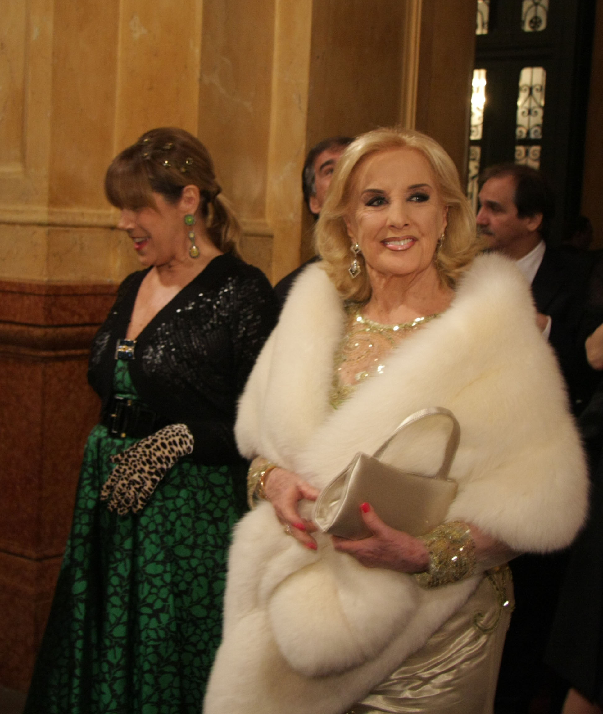 La conductora y actriz Mirtha Legrand llega al Teatro Colón para la función de reapertura.